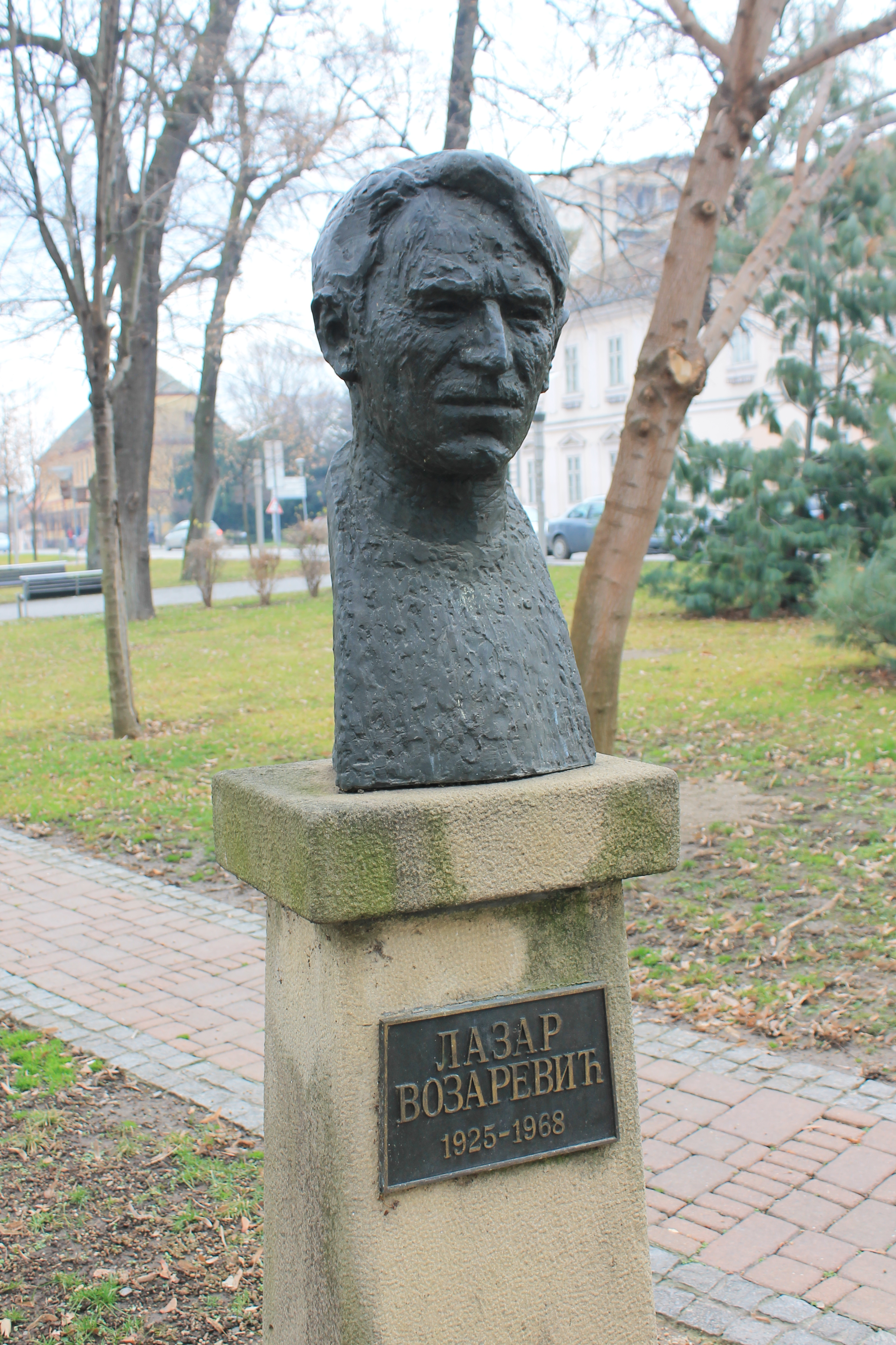 Galerija Lazar Vozarević, Sremska Mitrovica